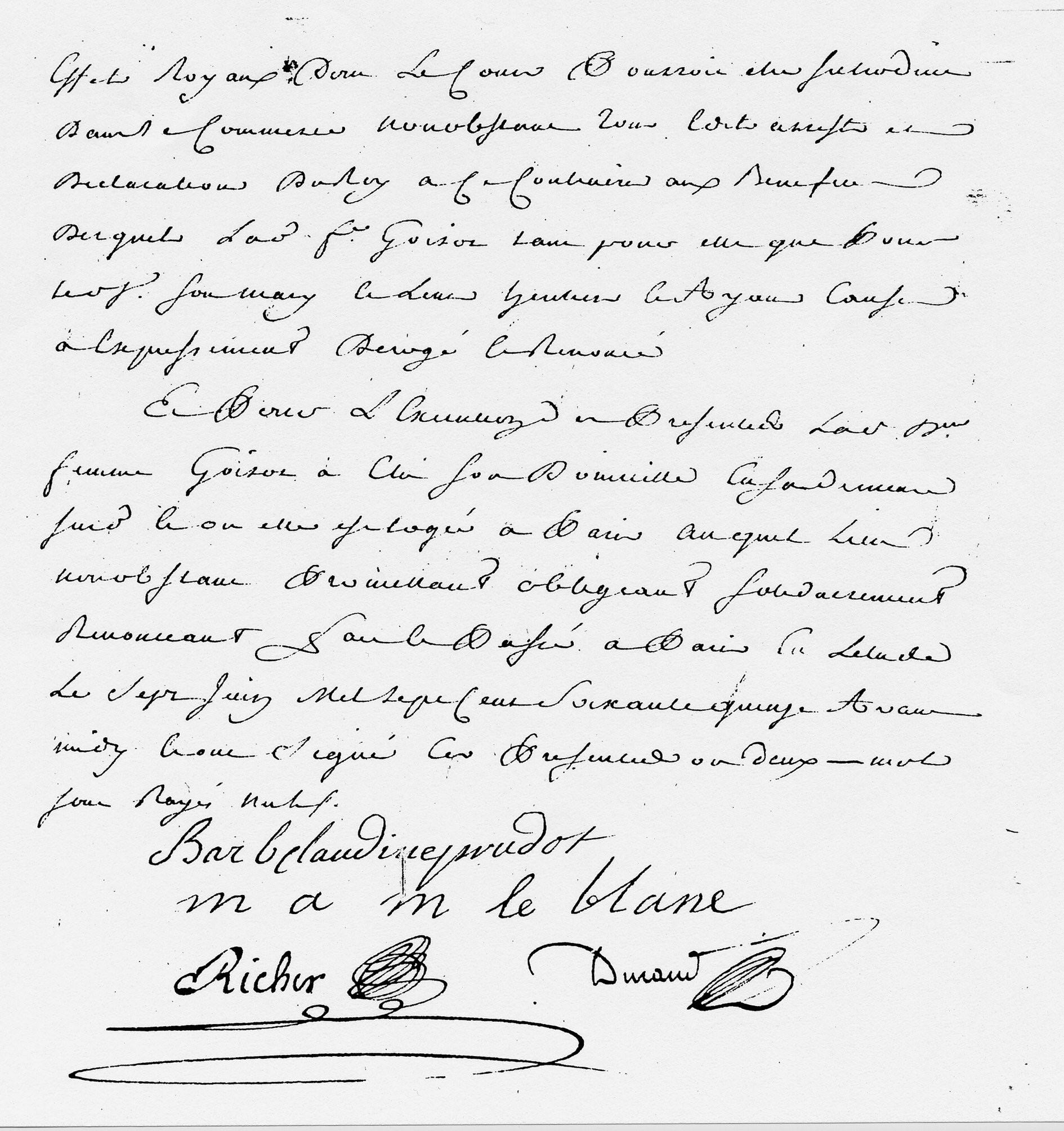 Prêt d'argent du 7 juin 1775, signé « M A M le blanc ».